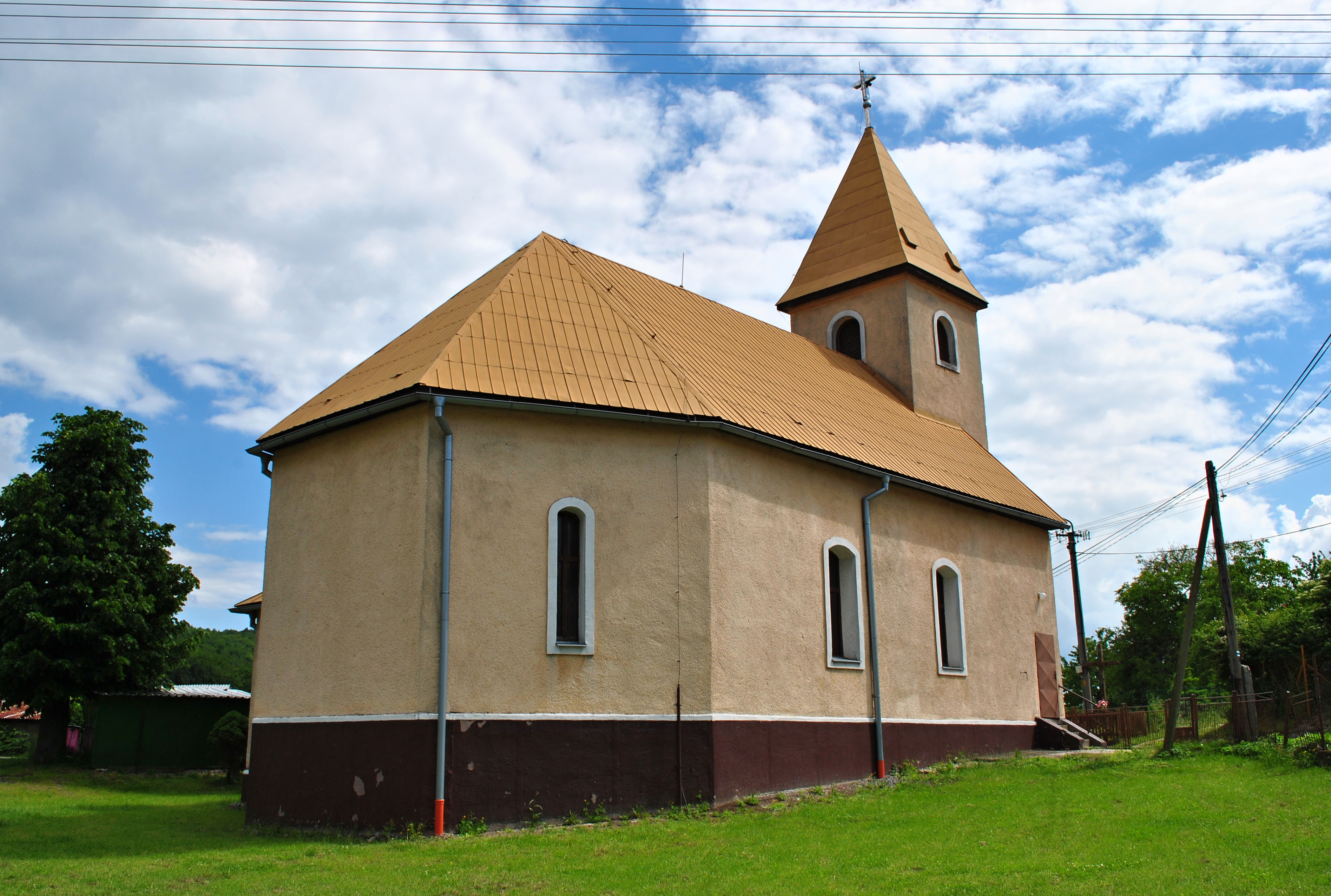 Uhliská, okres Levice - kostol sv. Michala